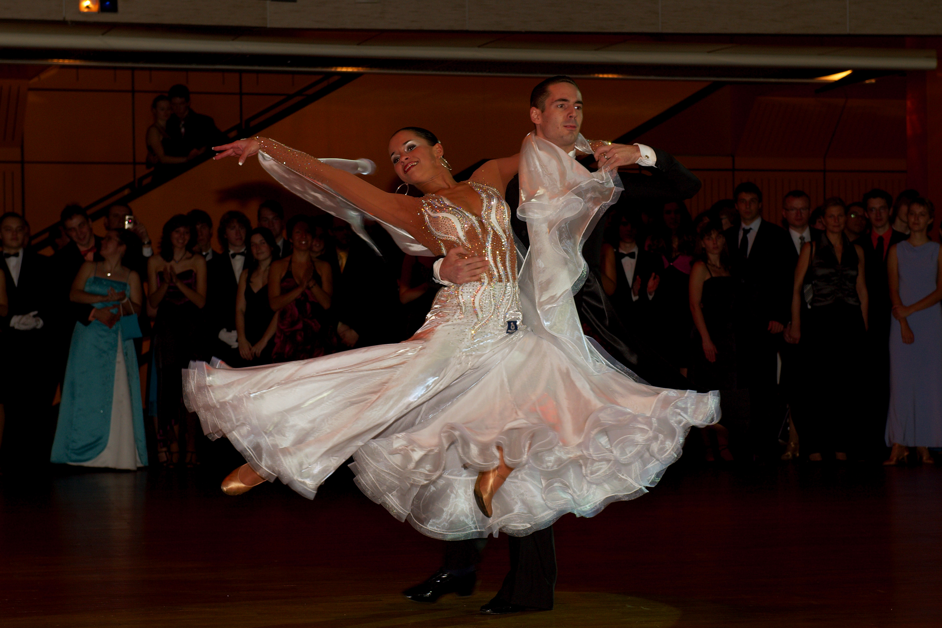 Foto ze show v Kongresovém paláci